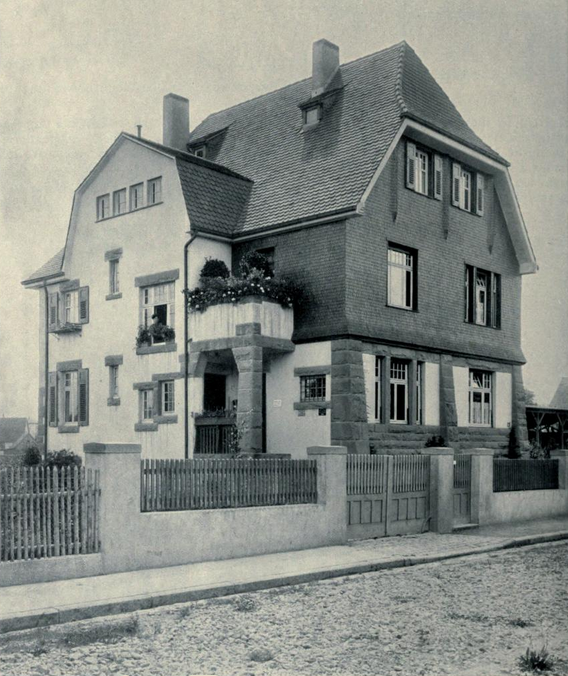 Haus Grimm in Bietigheim, Arch.: Beutinger & Steiner